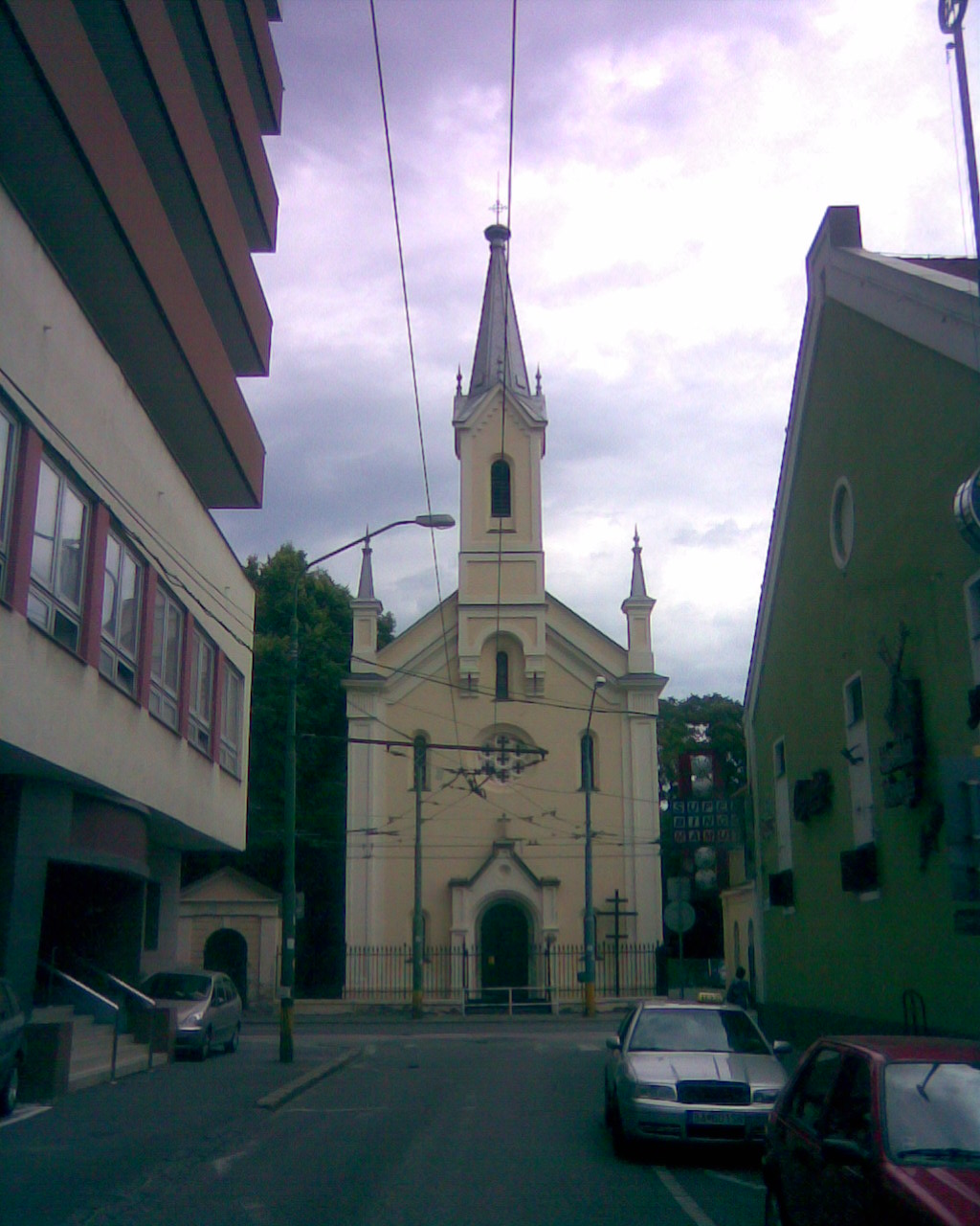 Chrám Povýšenia vznešeného a životodarného kríža This medium shows the protected monument with the number 101-279/5 in the Slovak Republic.